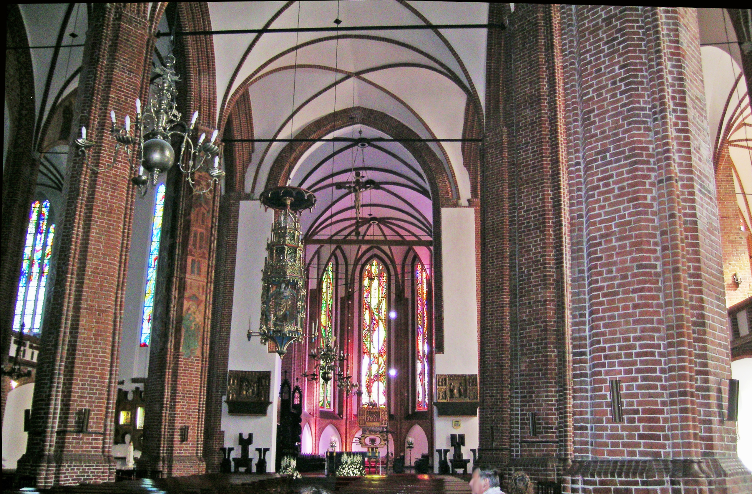 Langschiff mit Altarraum in der Marienbasilika Kolobrzeg (Kolberg), Polen